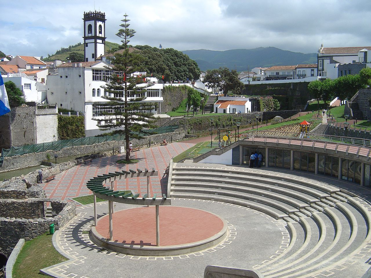 Ilha de S. Miguel